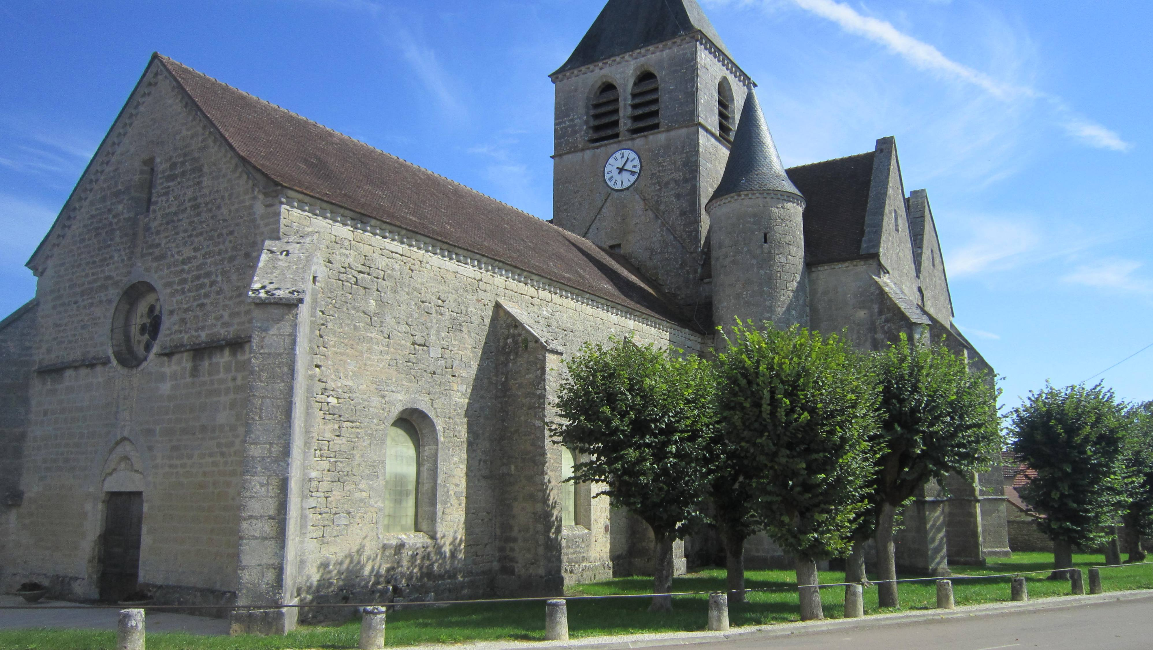 Eglise Saint-Pierre Saint-Paul de Nicey (Côte-d'Or)